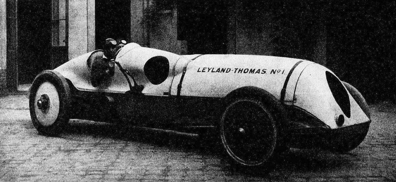 La Leyland-Thomas cinq cylindres de J.G. Parry-Thomas, en 1924